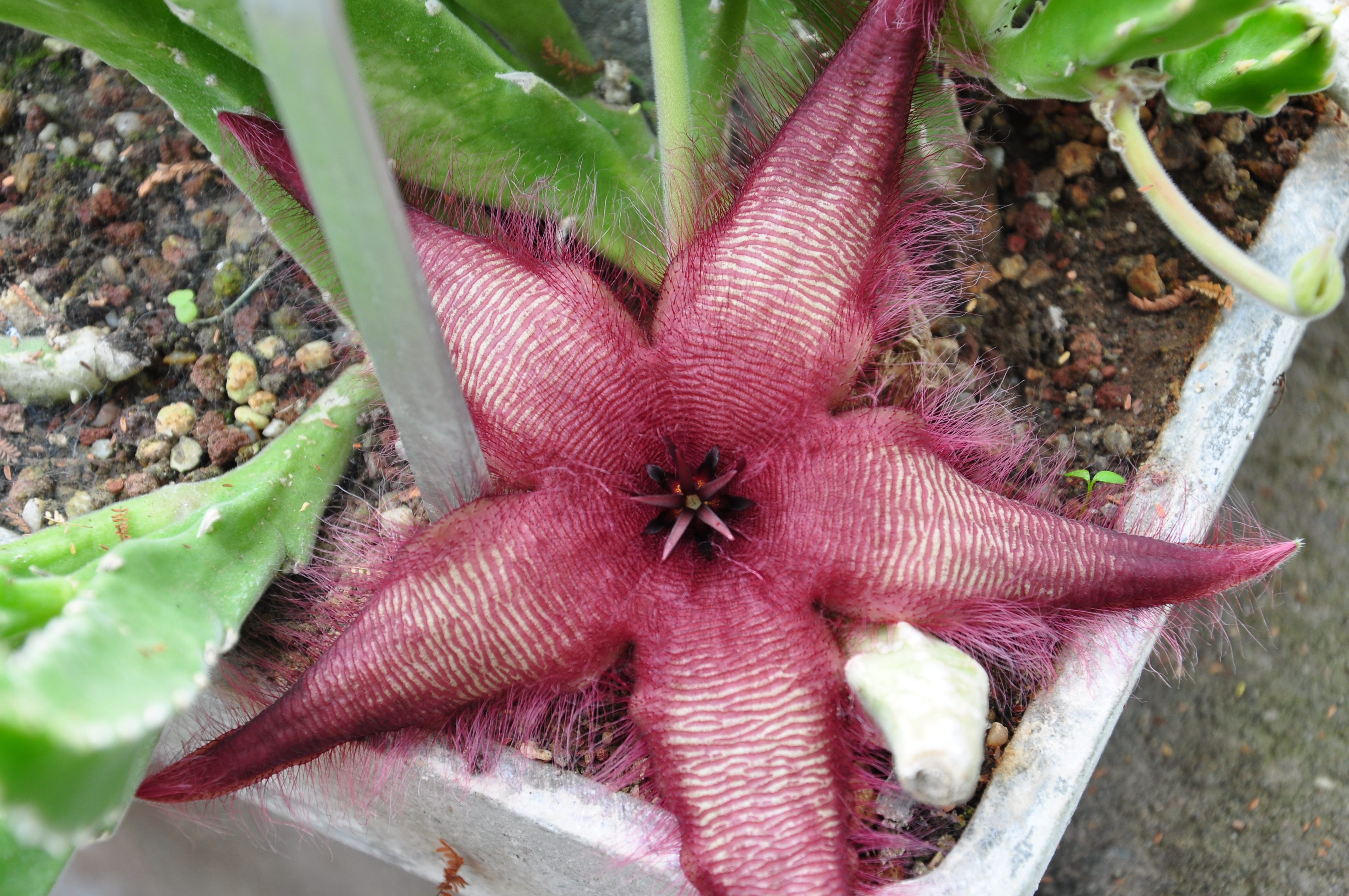 Botanischer Garten der Universität Zürich in Zürich-Weinegg (Switzerland) : Stapelia gettleffii R.Pott